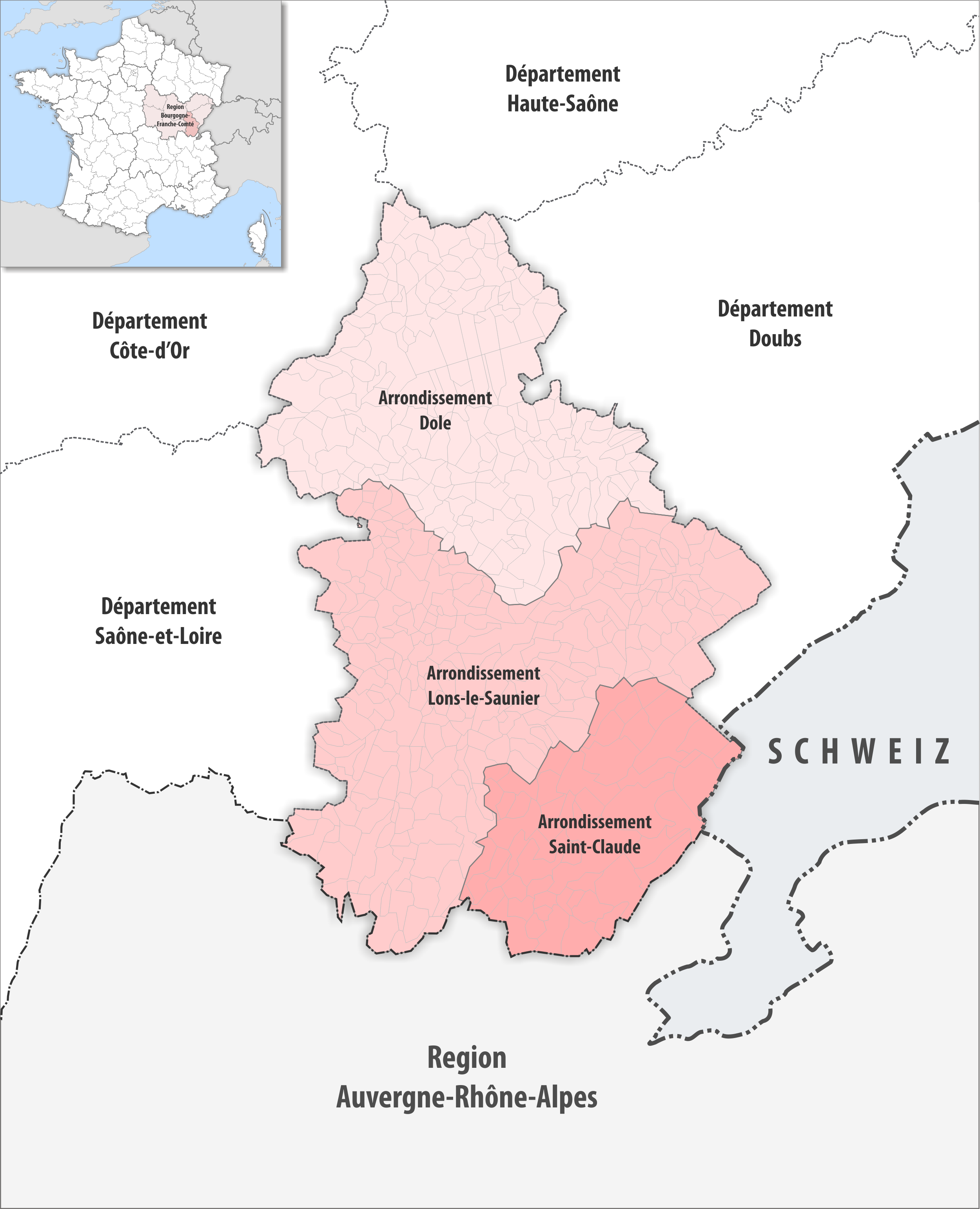 Gemeinden und Arrondissemente im Departement Jura